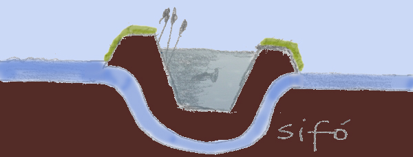 Schematische voorstelling van het principe van de duiker of sifon bij de kruising van twee waterwegen